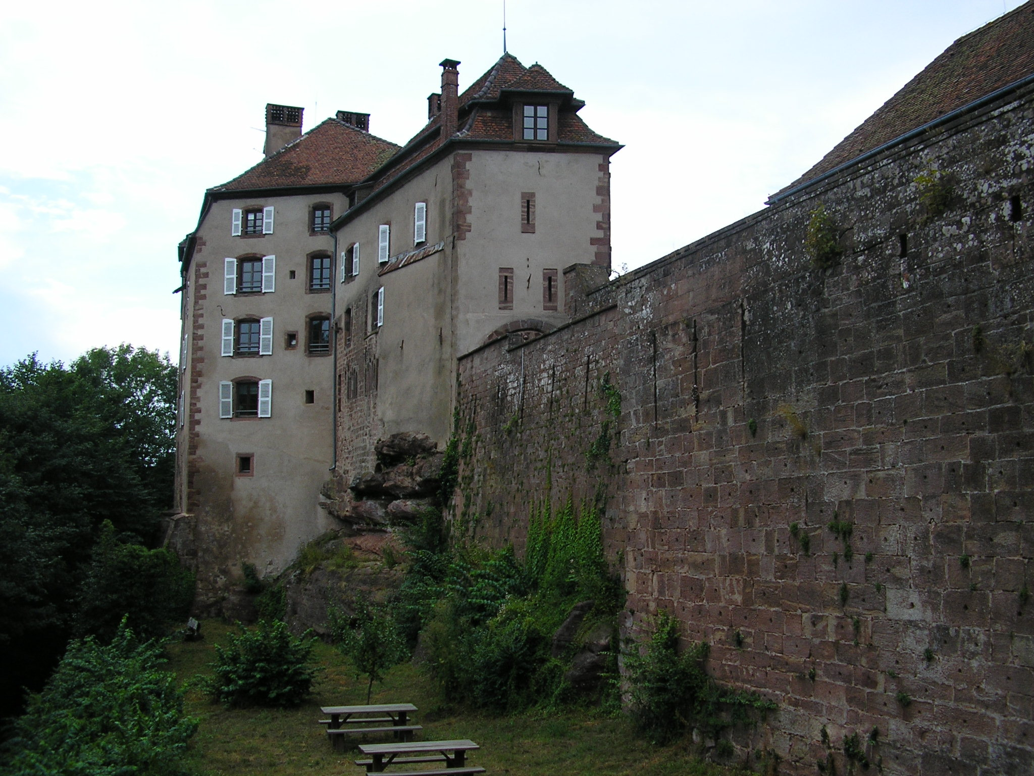 Chateau de La Petite Pierre (67)